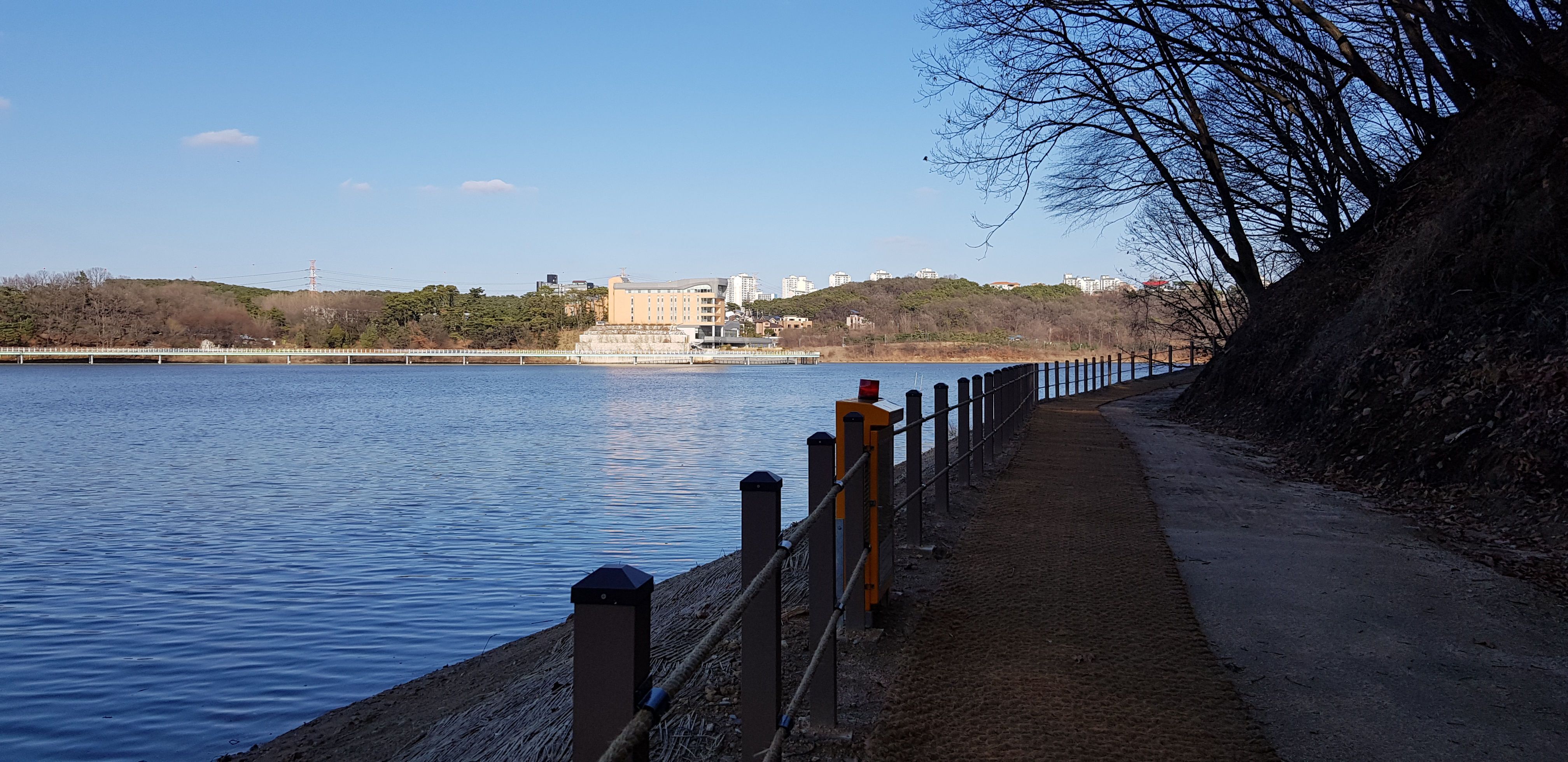 기흥순환 산책로 13